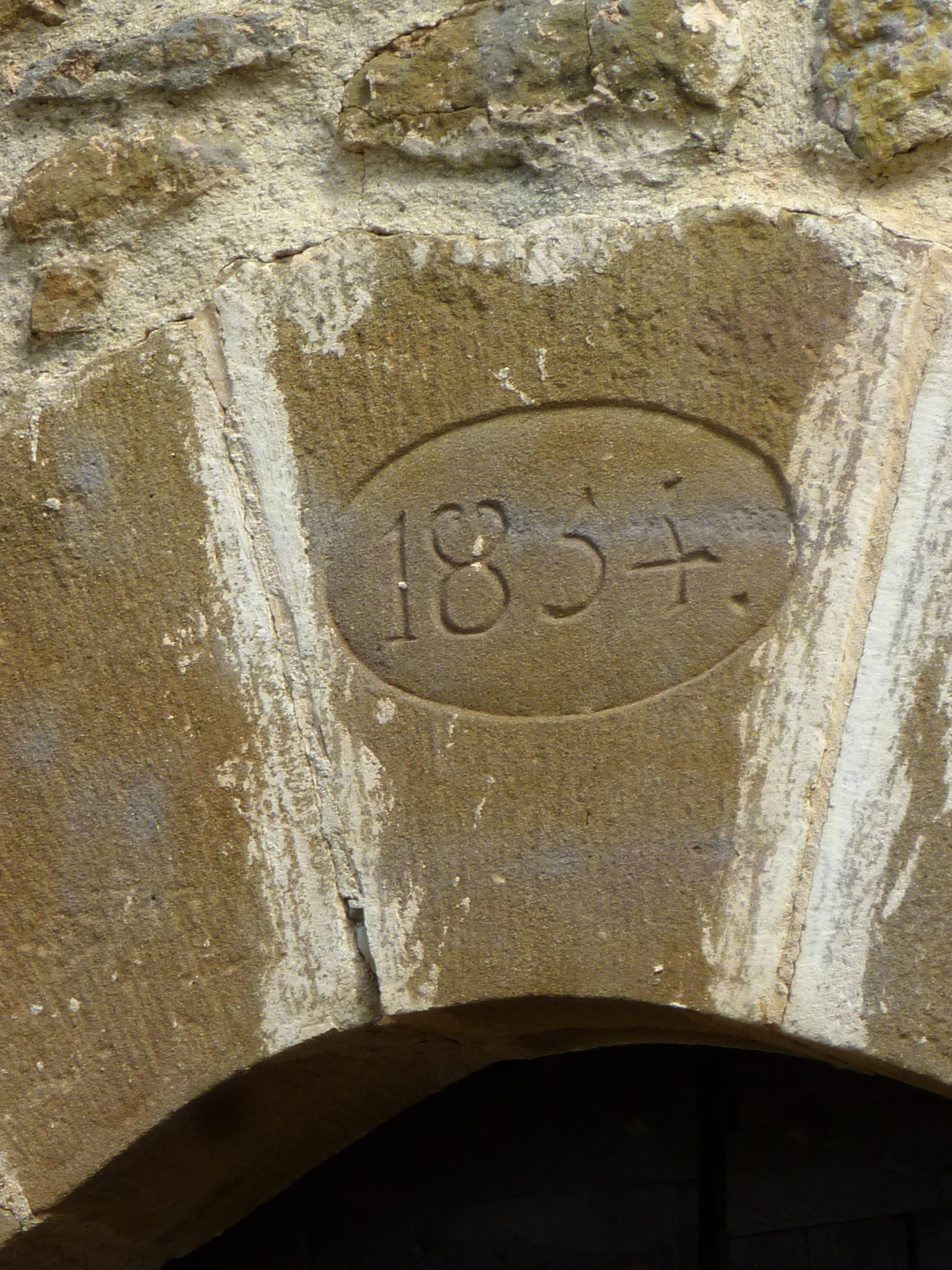 Capella de Santa Rosa de Mas d'en Bosc (la Baronia de Rialb): clau del portal